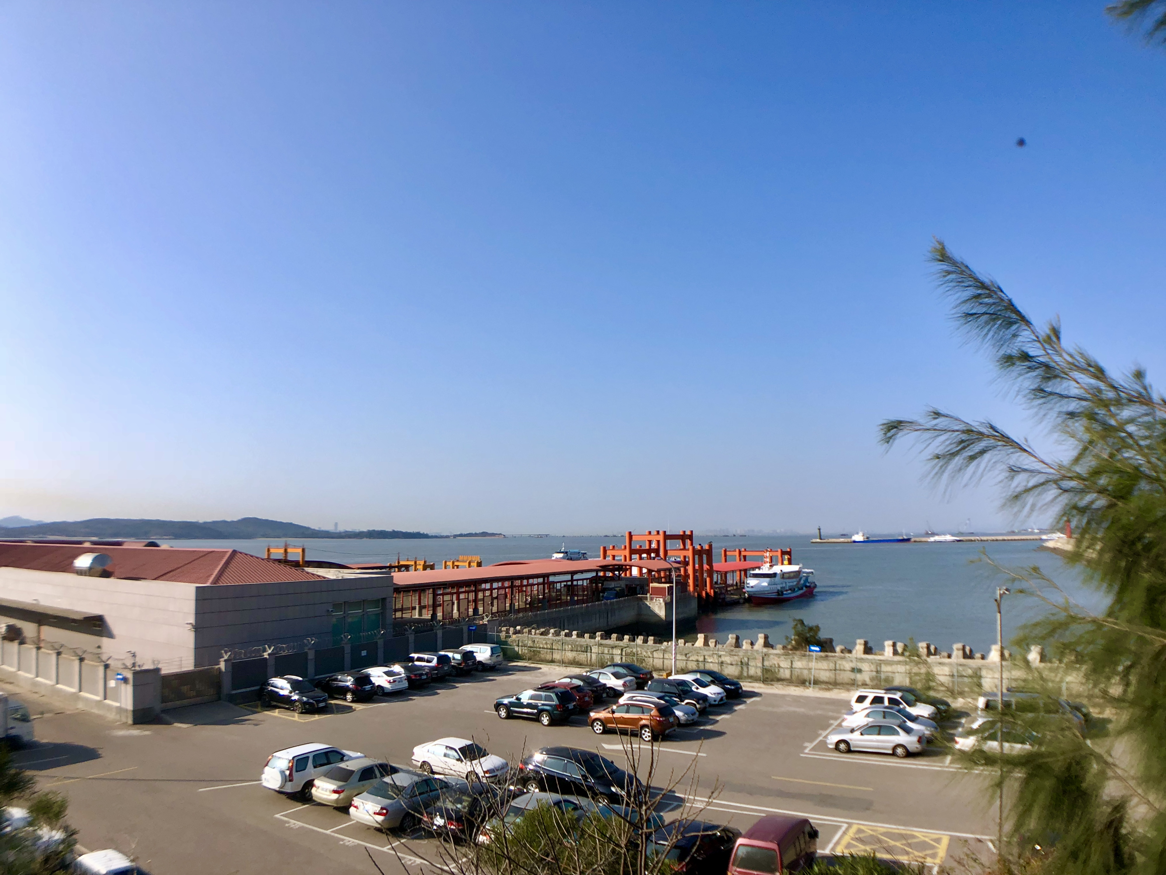 由稚暉亭處遠眺水頭碼頭